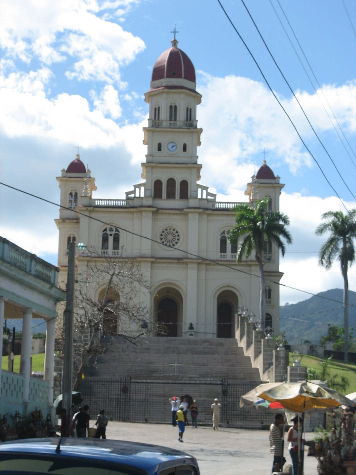 Front side of the church "Virgen de la Caridad del Cobre" in Santiago de Cuba